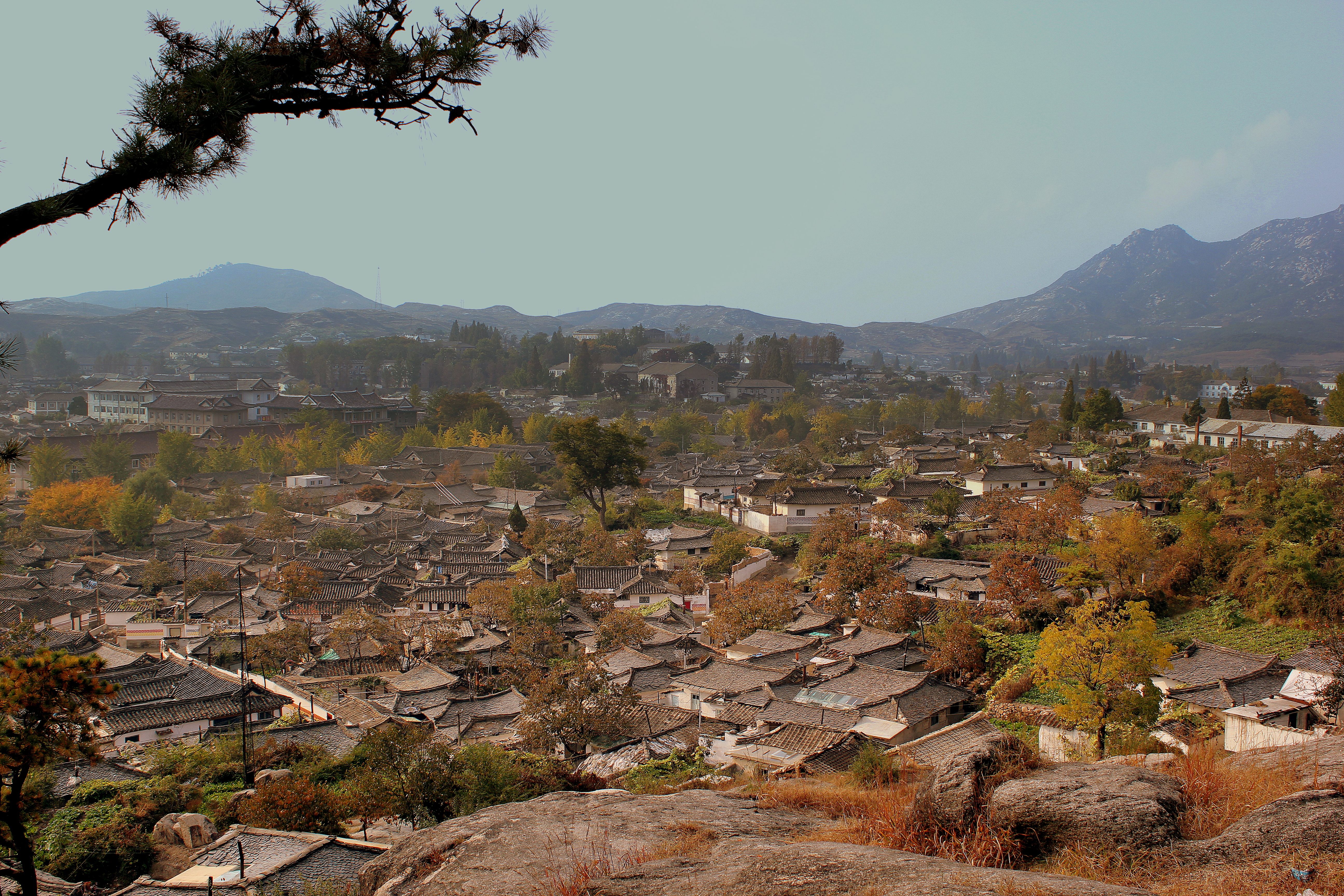 VIEW OF KAESONG CITY NEAR THE JOINT SECURITY AREA DMZ DPRK NORTH KOREA OCT 2012